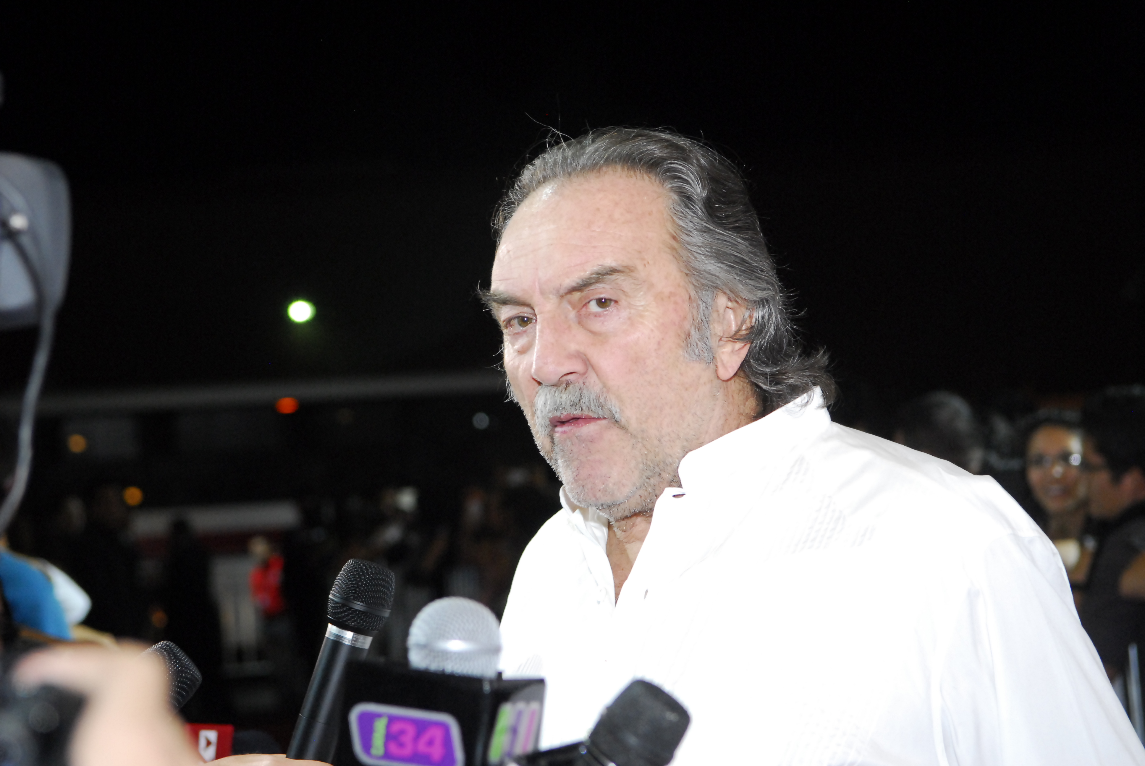 Pedro Armendariz-Gala de beneficencia Mother & child Director Rodrígo García-17_03_10-©cortesía de FICG 25_Oscar Delgado (5)